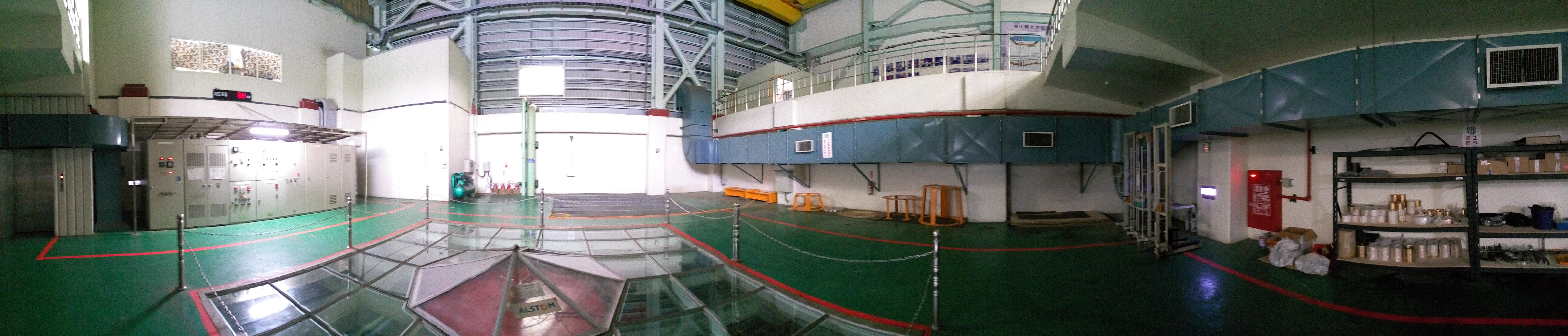 中文（台灣）: 烏山頭水力發電廠廠房內部全景圖